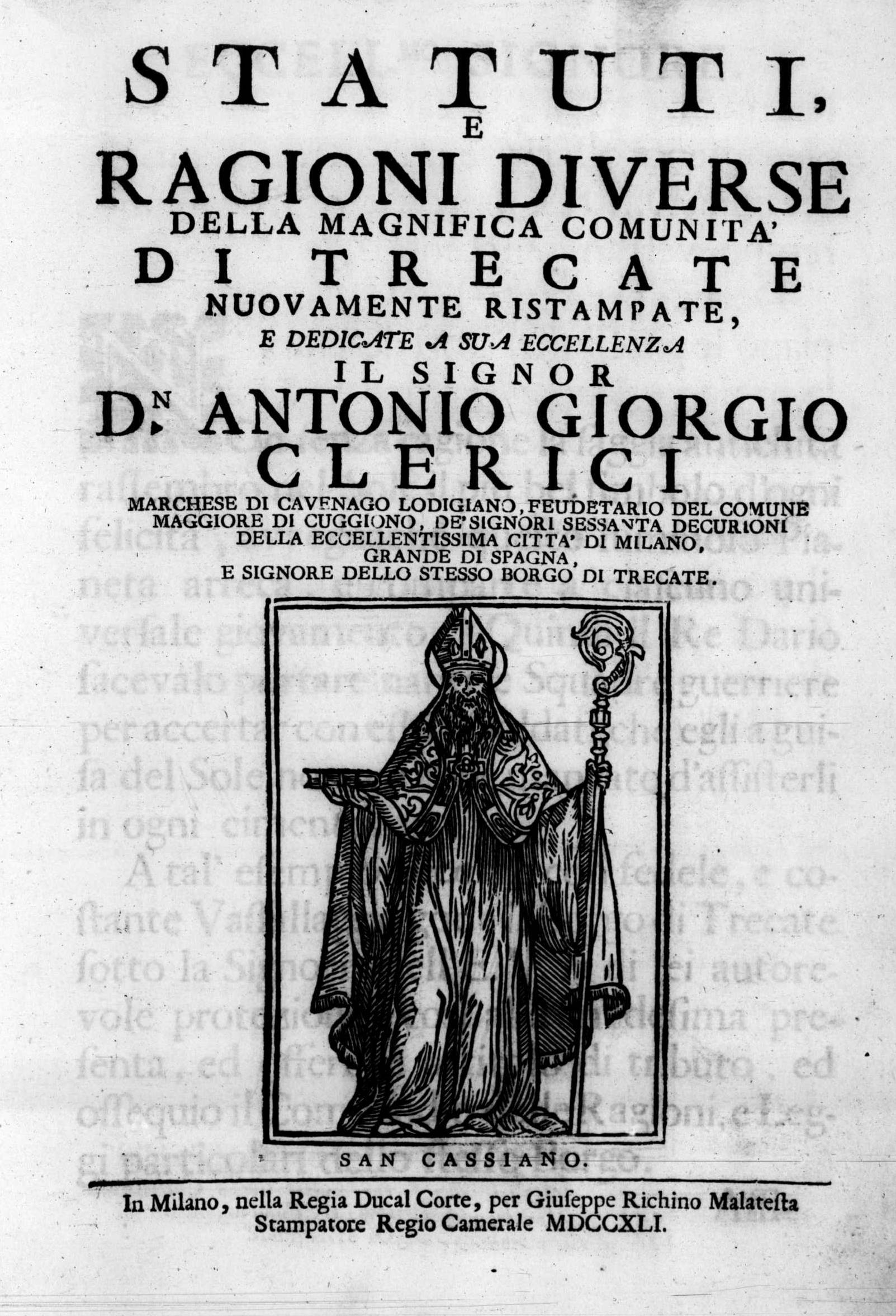 Frontespizio